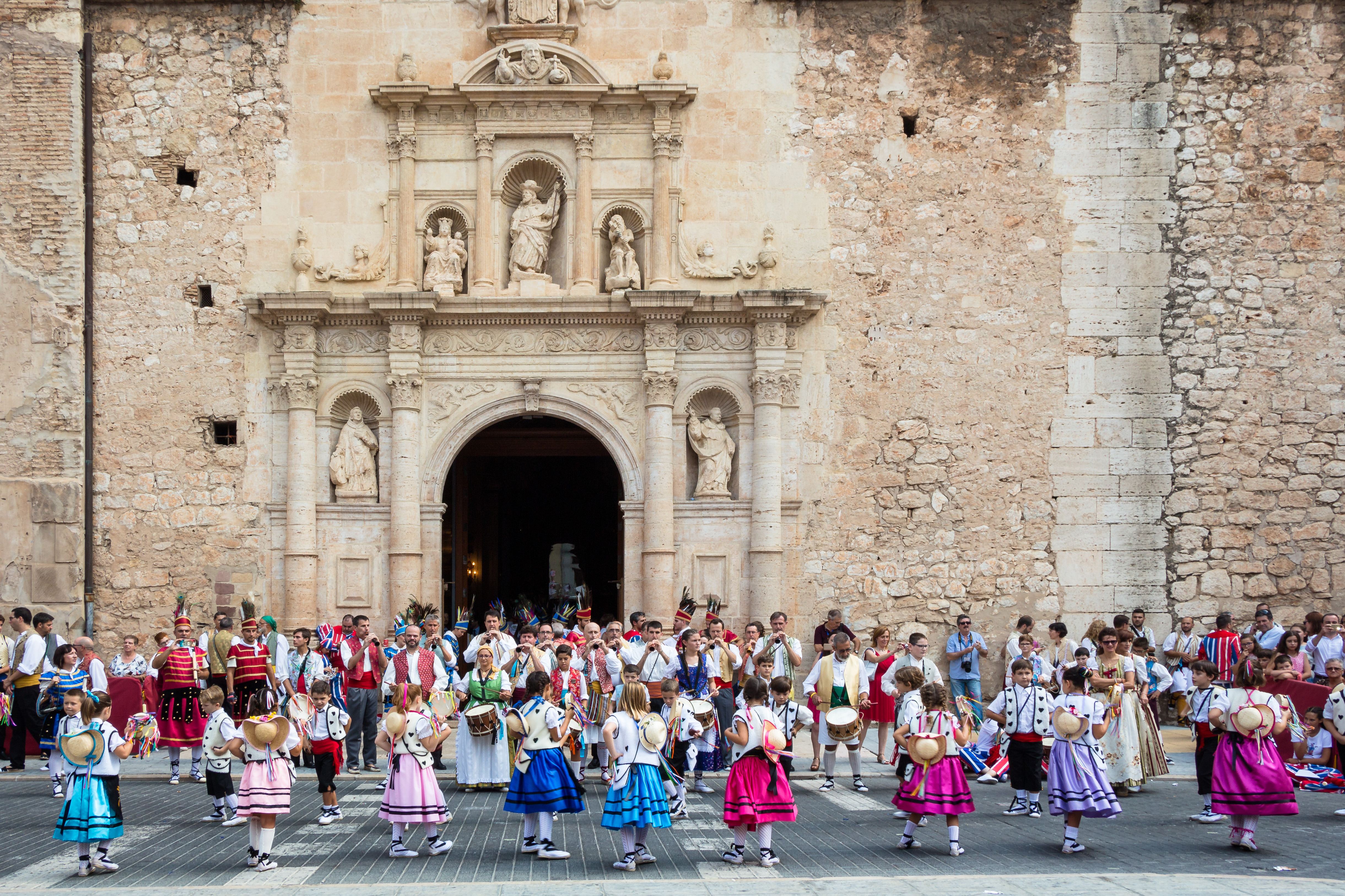 Les Pastoretes es el baile en el que participan los niños y niñas de más corta edad. This is a photography of a Folklore festival in Spain (Wikidata id Q3290365).